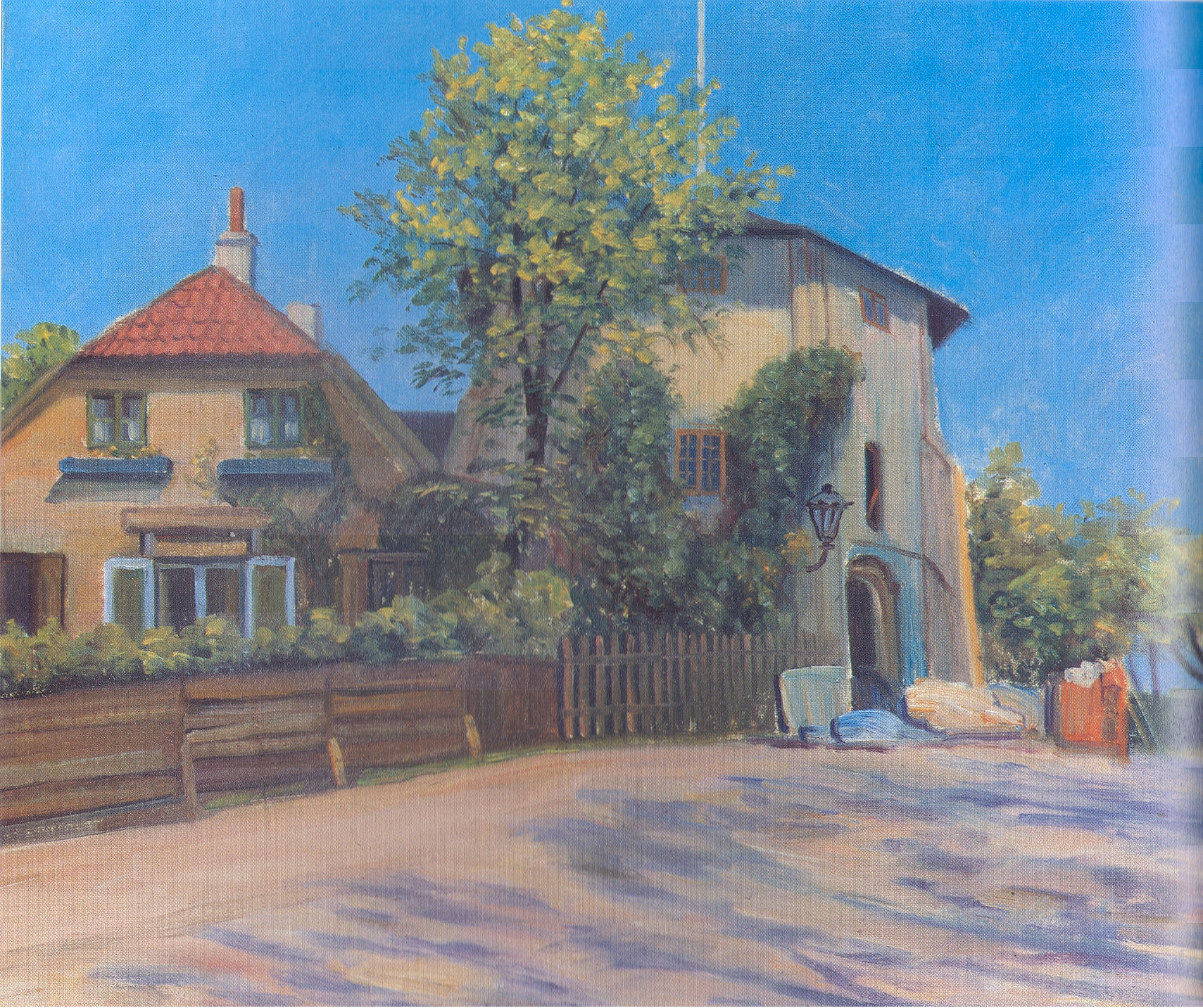 Maleri af lille mølle